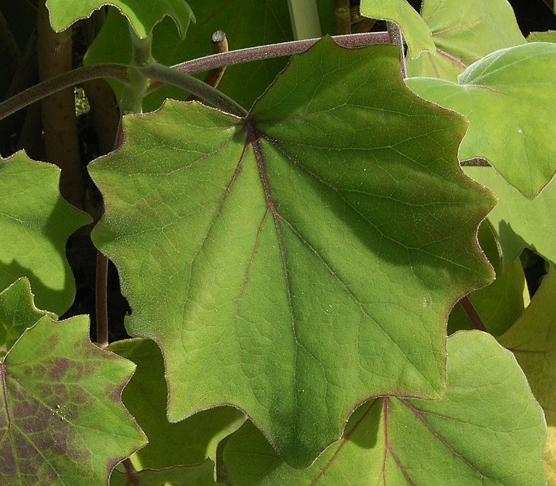 Senecio petasites